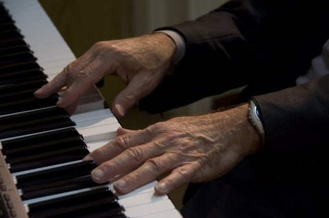 יוסי מר חיים השולחן עבודת כיתה צילום אלדד מאסטרו